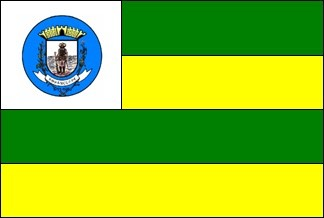 Bandeira do município goiano Anhanguera